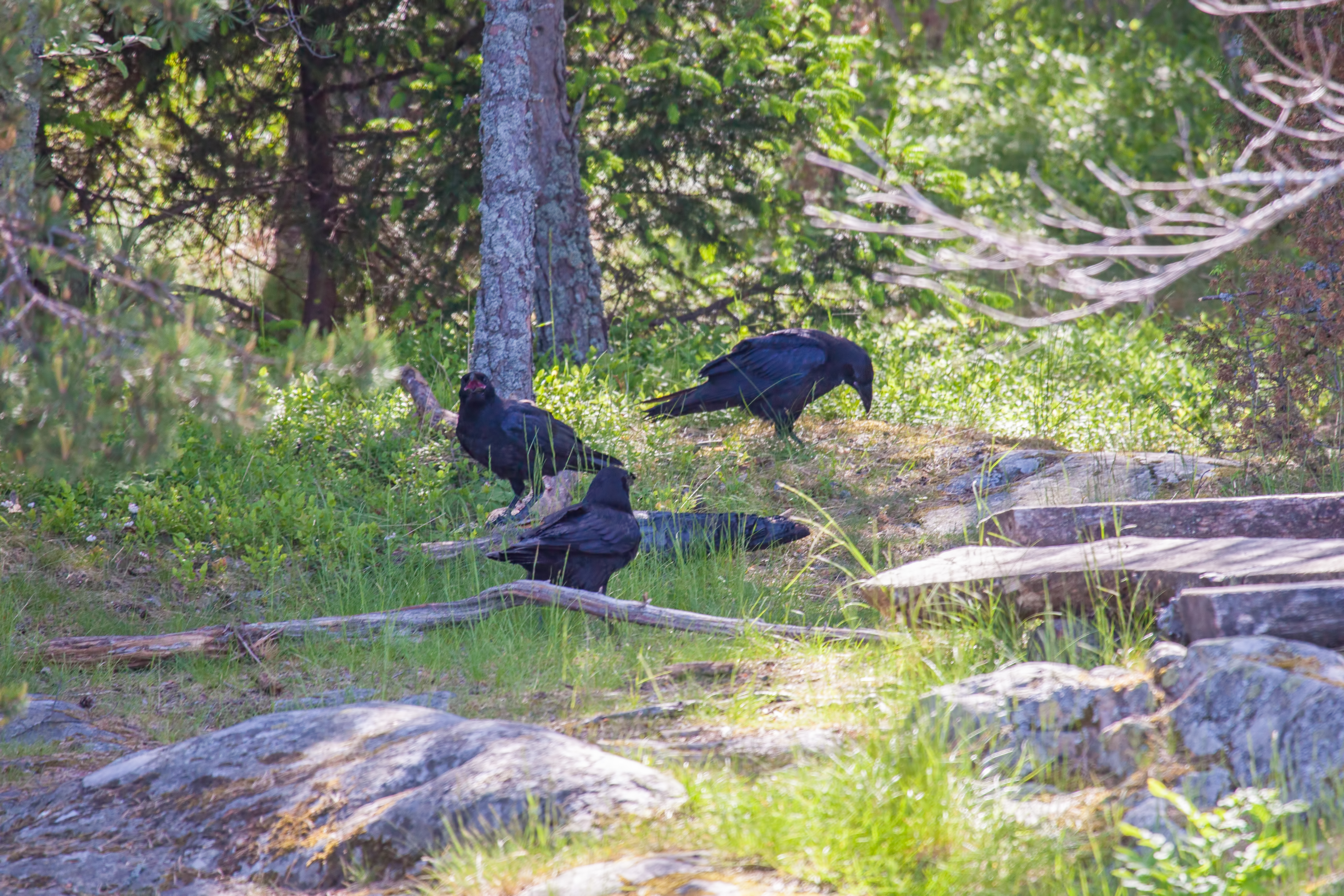 Korp, Raven, Corvus corax, Vaxholm, Stockholm, Sweden